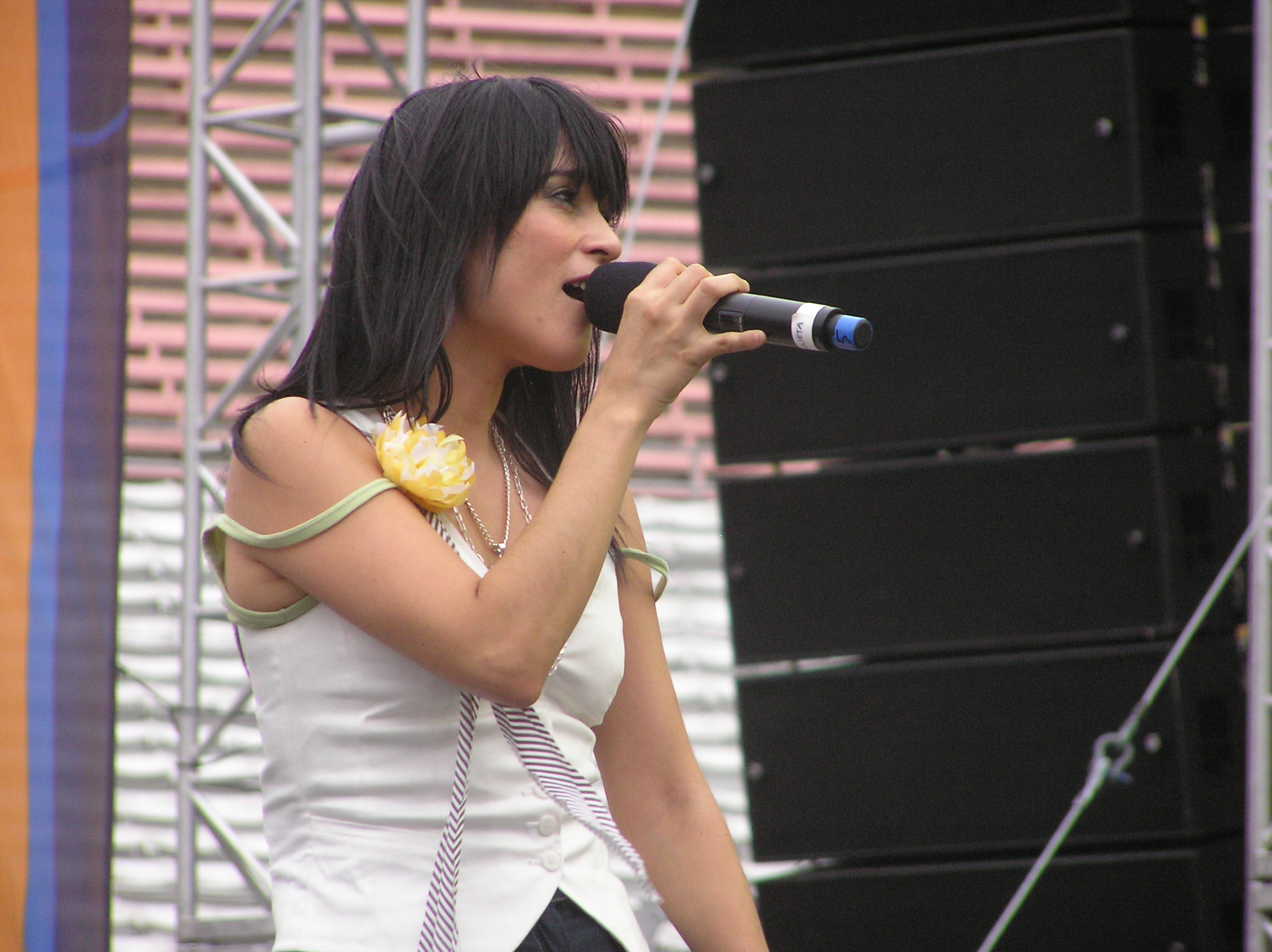 Venegas en el Reventon Superestrella, en el Coliseo de Los Ángeles, 2006.